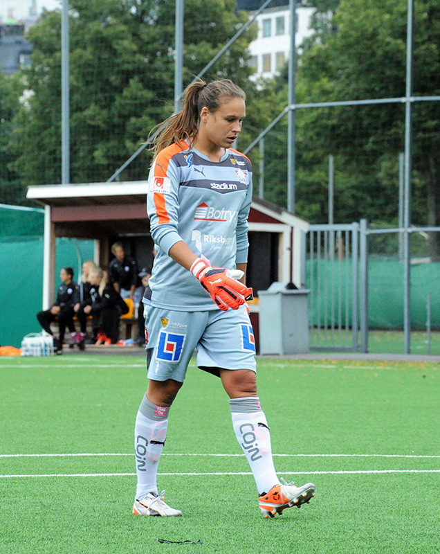 a_68_1614